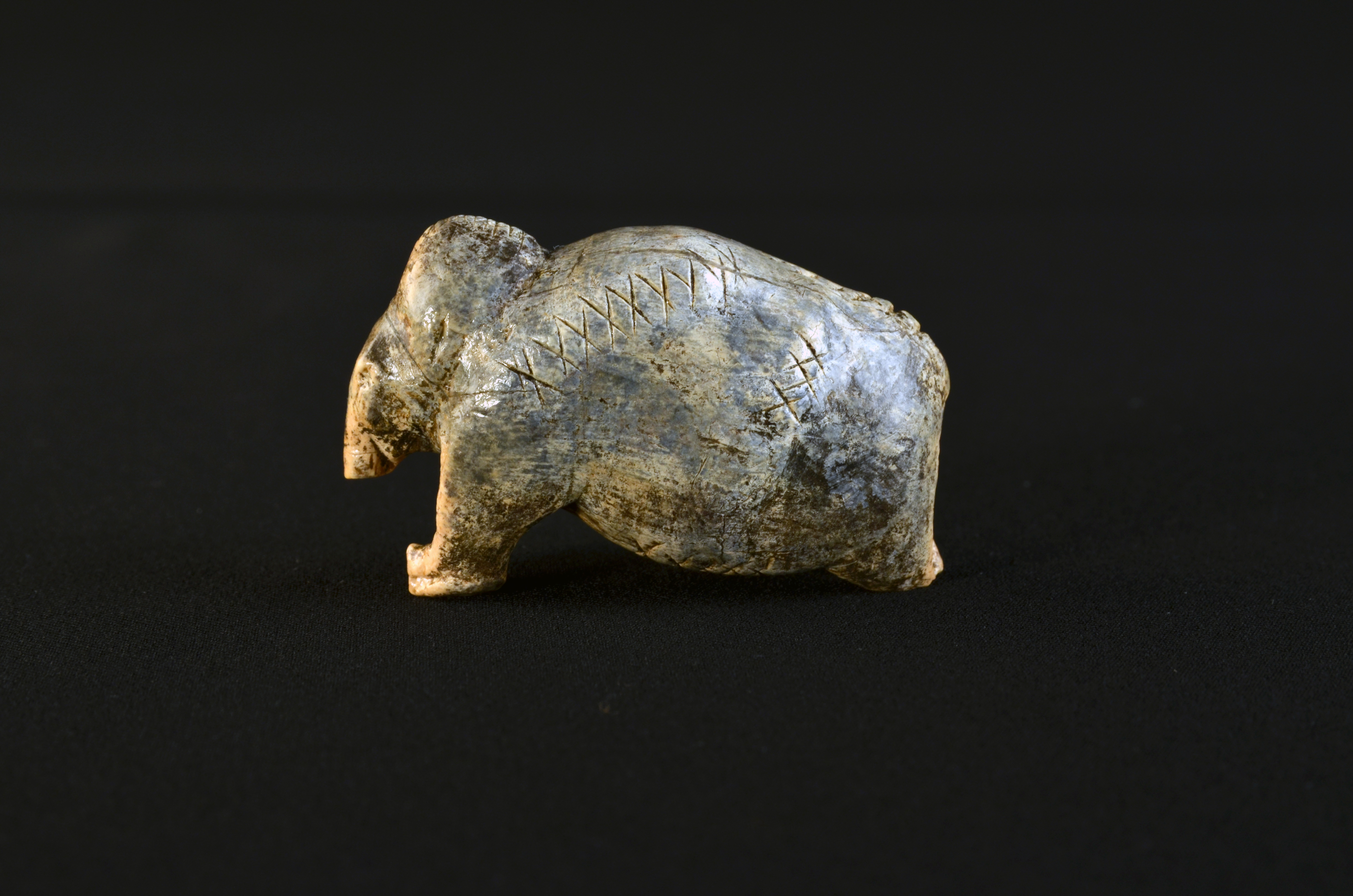 Mammut, Tierplastik aus Elfenbein, Vogelherdhöhle Grabung Gustav Riek 1931.